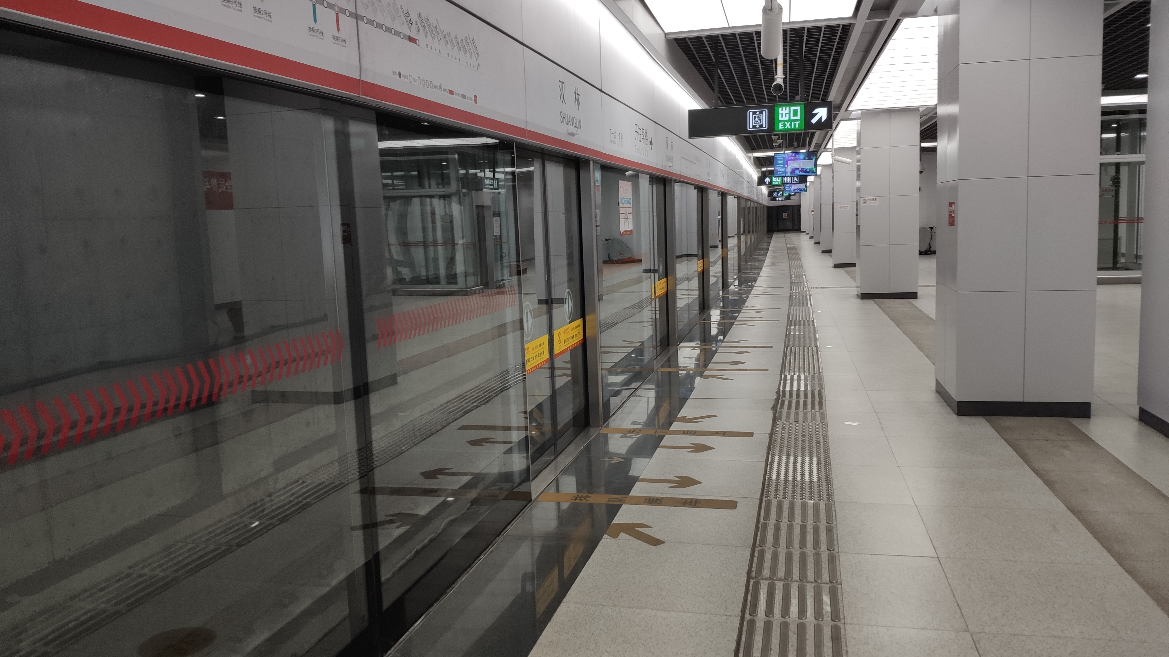 天津地铁1号线新双林站的侧式站台